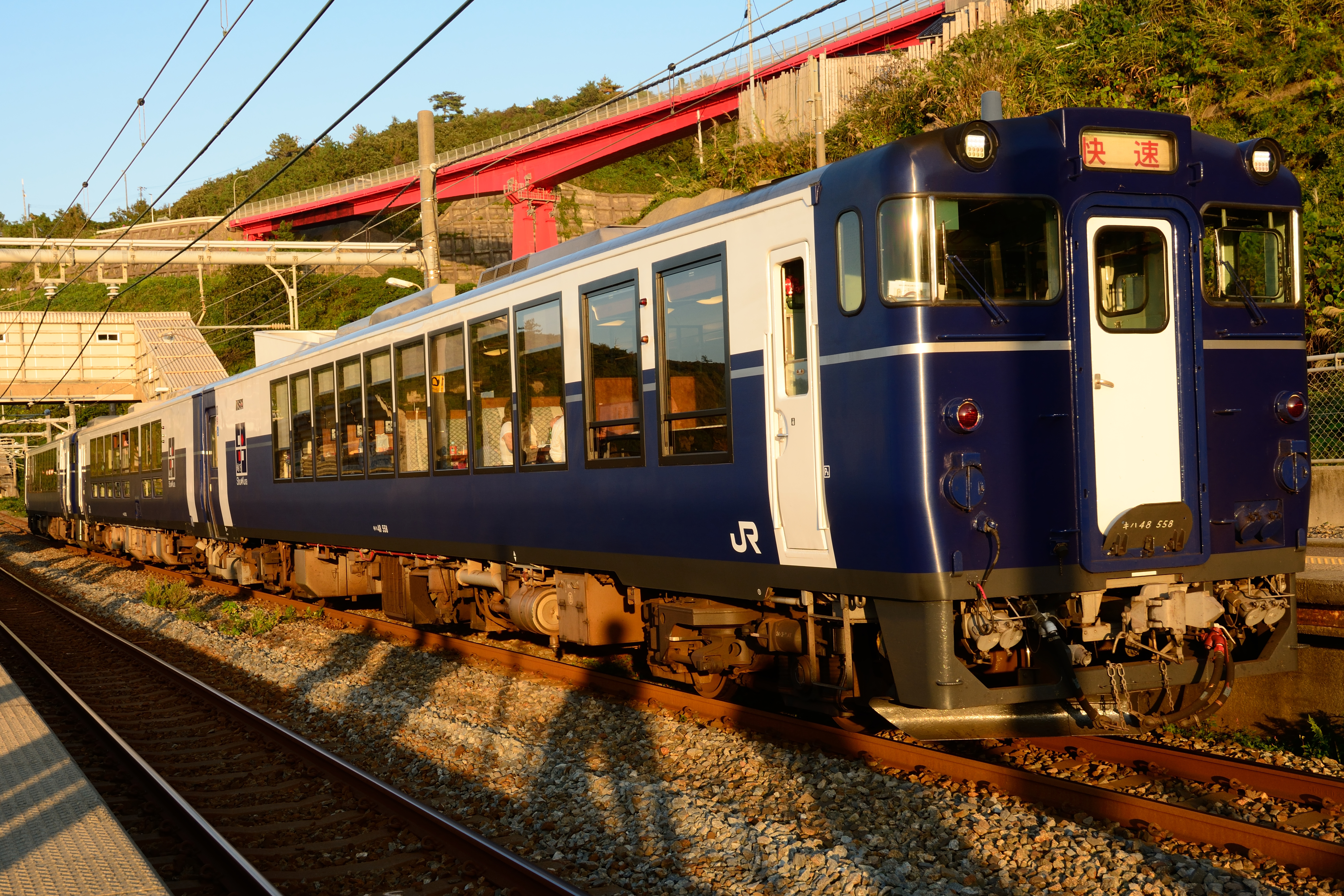 青海川駅停車中の越乃Shu＊Kura